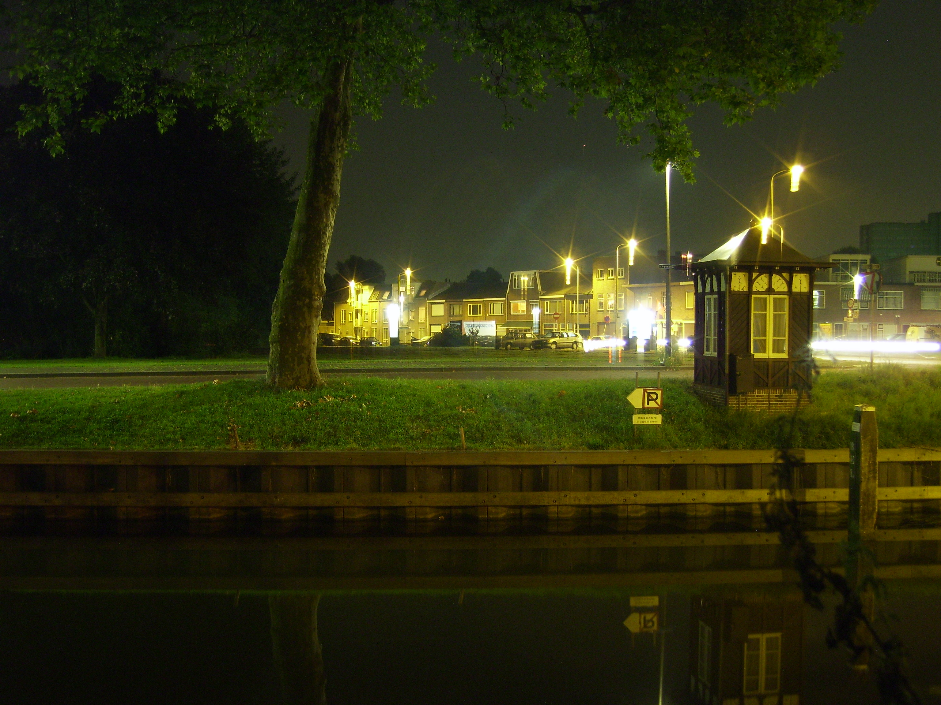 Stad Utrecht: brugwachtershuisje aan de rivier de Vecht bij de Rode brug, met op de achtergrond de Loevenhoutsedijk